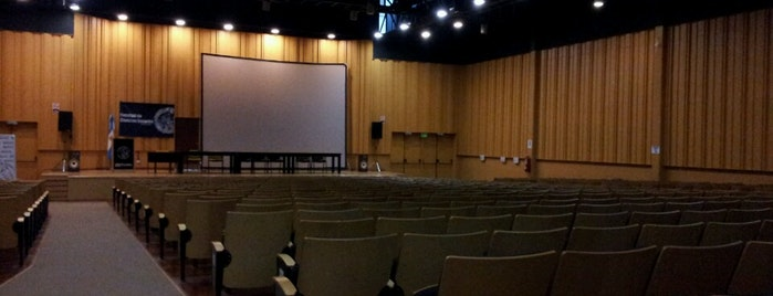 Interior del auditorio principal de la facultad